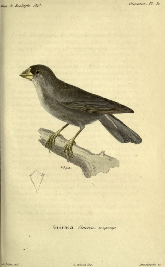 Mag. de Zoologie 1843, Oiseaux Pl 30, Guiraca cinerea = Piezorhina cinerea, Pêtre, pinx., N. Rémond imp., Annedouche sc.